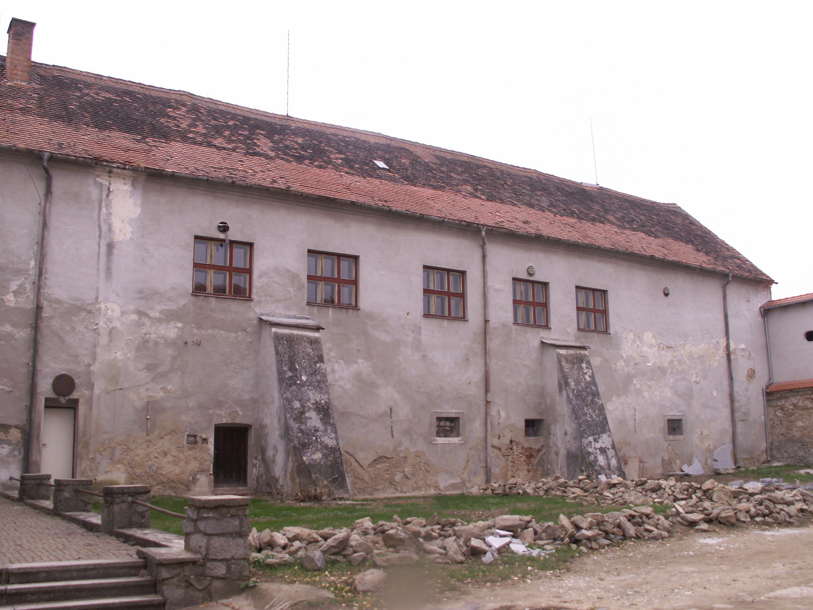 Slatina (okres Znojmo) - renesanční zámek, hospodářská část